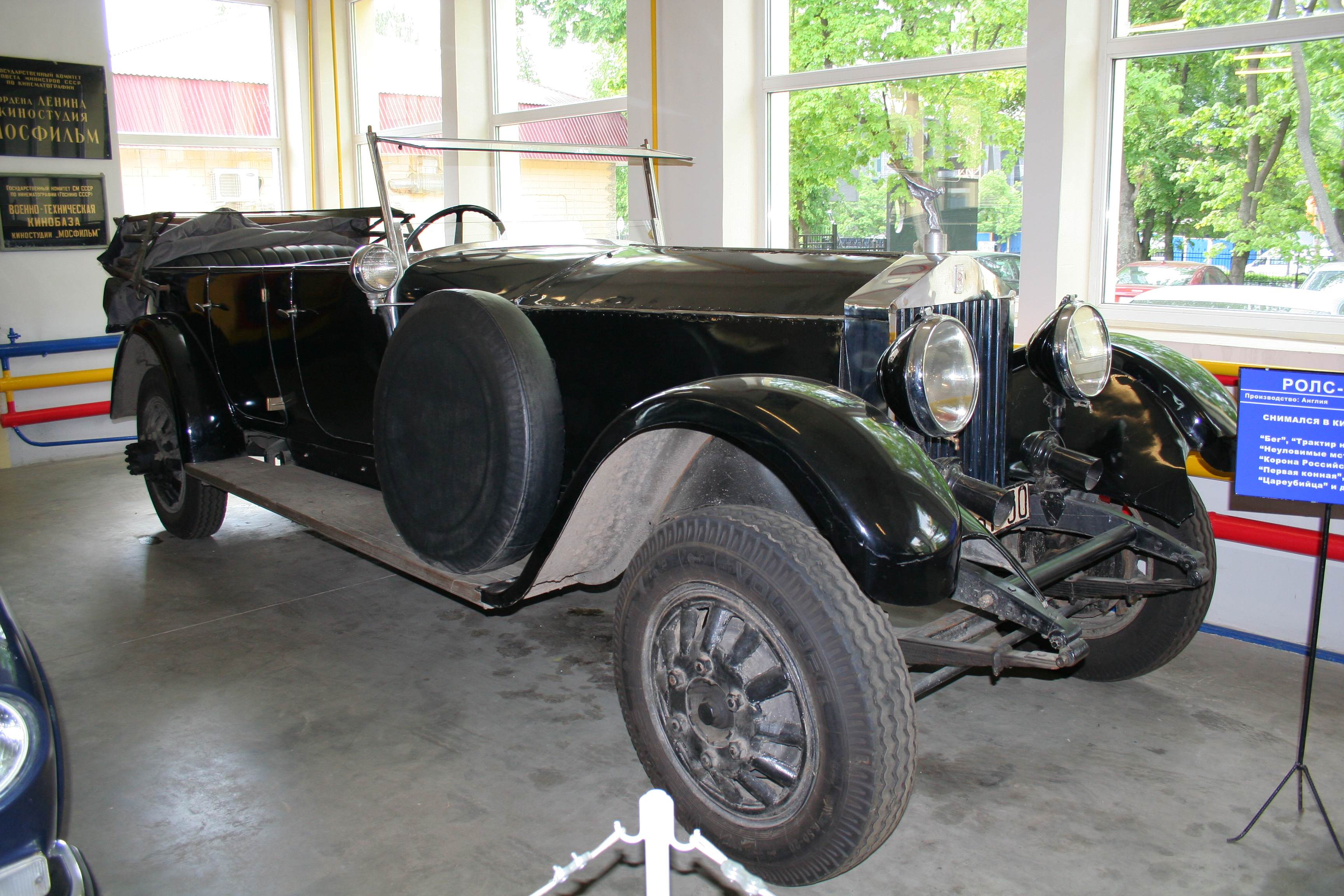 Museum auf dem Gelände des Filmstudios Mosfilm in Moskau. Die Exposition. Ein Rolls-Royce, Baujahr 1913.